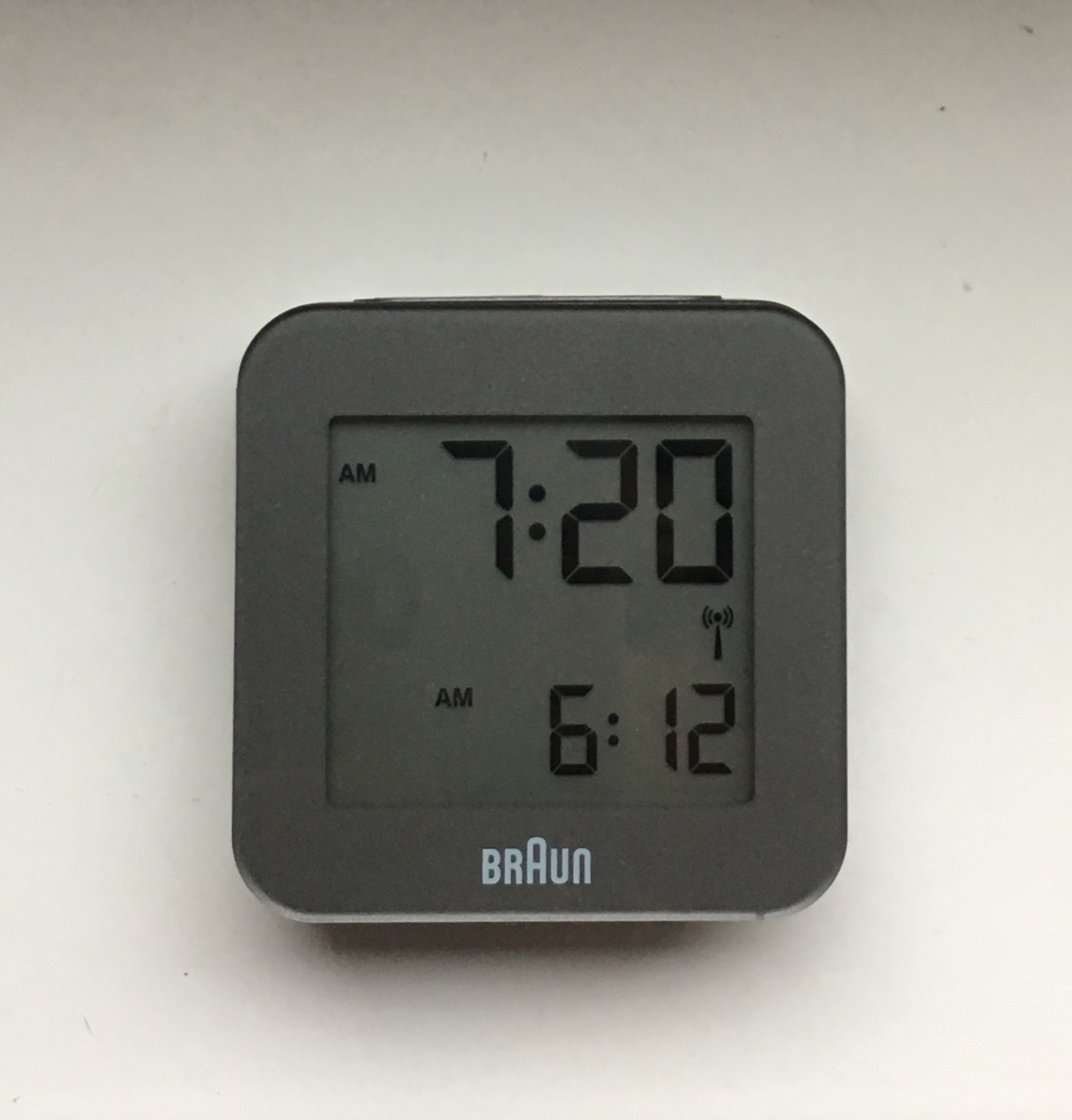 Braun Funkwecker